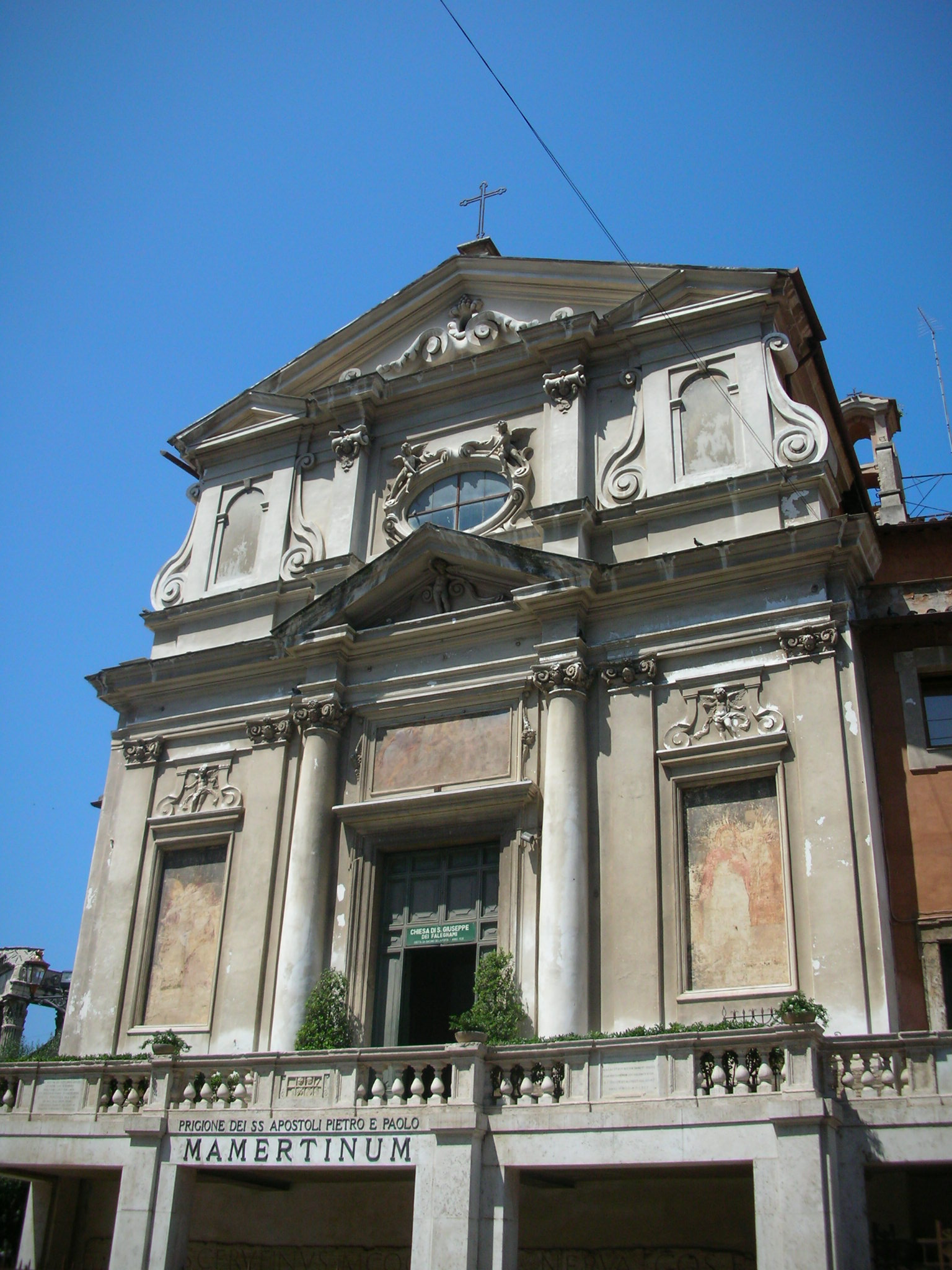 San Giuseppe dei Falegnami, facciata